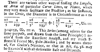 Extrait du Synopsis Palmariorum Matheseos (1706) de William Jones, présentant la formule trouvée par John Machin (1686-1751) qui permet de calculer, avec une précision de plus de 100 décimales, le rapport entre le diamètre et la circonférence d'un cercle (π).